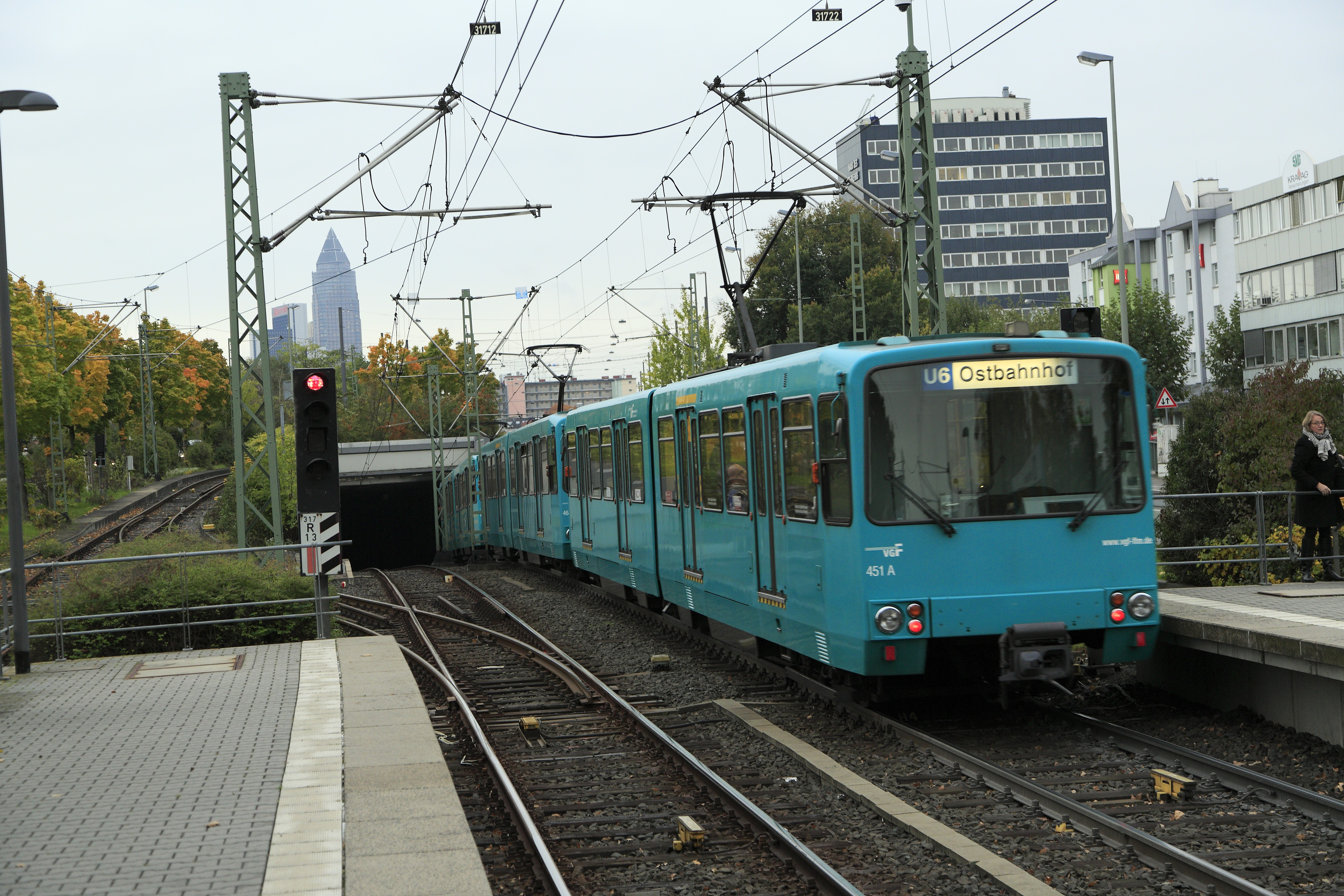 Dreifacheinheit der VGF-Reihe U3, Zug der Linie Bahnhof Frankfurt (Main) Ost bei der Einfahrt in den Tunnel der Stammstrecke C. Die Wagen der Reihe U3 waren die ersten echten Voll-U-Bahn-Wagen der VGF ohne Klapptrittstufen, die zu Anfang nur au der Linie U4 eingesetzt werden konnten. Die seitlich abzweigenden Gleise sind Übergangsgleise zum Straßenbahnnetz, bis zur Einstellung des Güterverkehrs waren sie außerdem die Verbindung zum Fernbahnnetz. Wegen des Güterverkehrs und des Betriebes mit den Pt-Wagen mit einer Breite von nur 2,35 Metern gab es hier lange keine über SO erhöhten Bahnsteige.